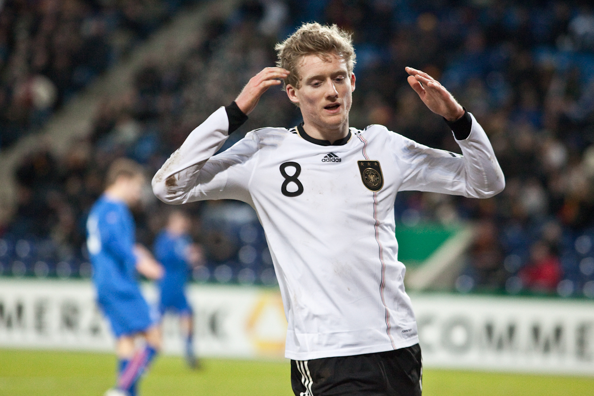 Andre Schürrle im U-21-Länderspiel Deutschland gegen Island.